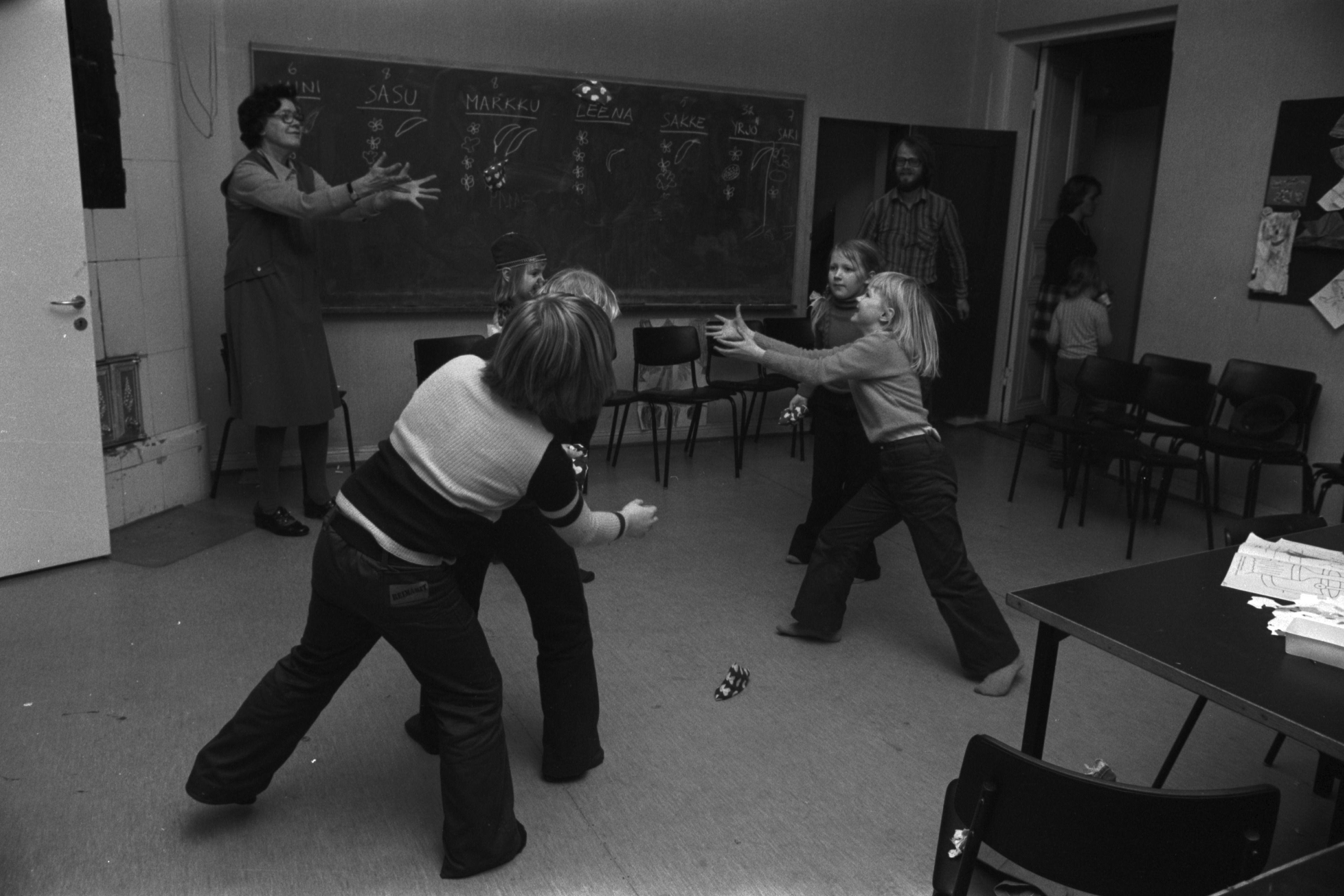 Lapsia leikkimässä Kruununhaan asukasyhdistyksen järjestämässä avainlapsikerhossa Unioninkatu 43:n vanhassa kaksikerroksisessa kivitalossa. Varatuomari Lempi Hartikka (1907–2001) Kruununhaka-Seurasta kävi ohjaamassa lapsia, kuvassa heittelemässä hernepussia lasten kanssa.